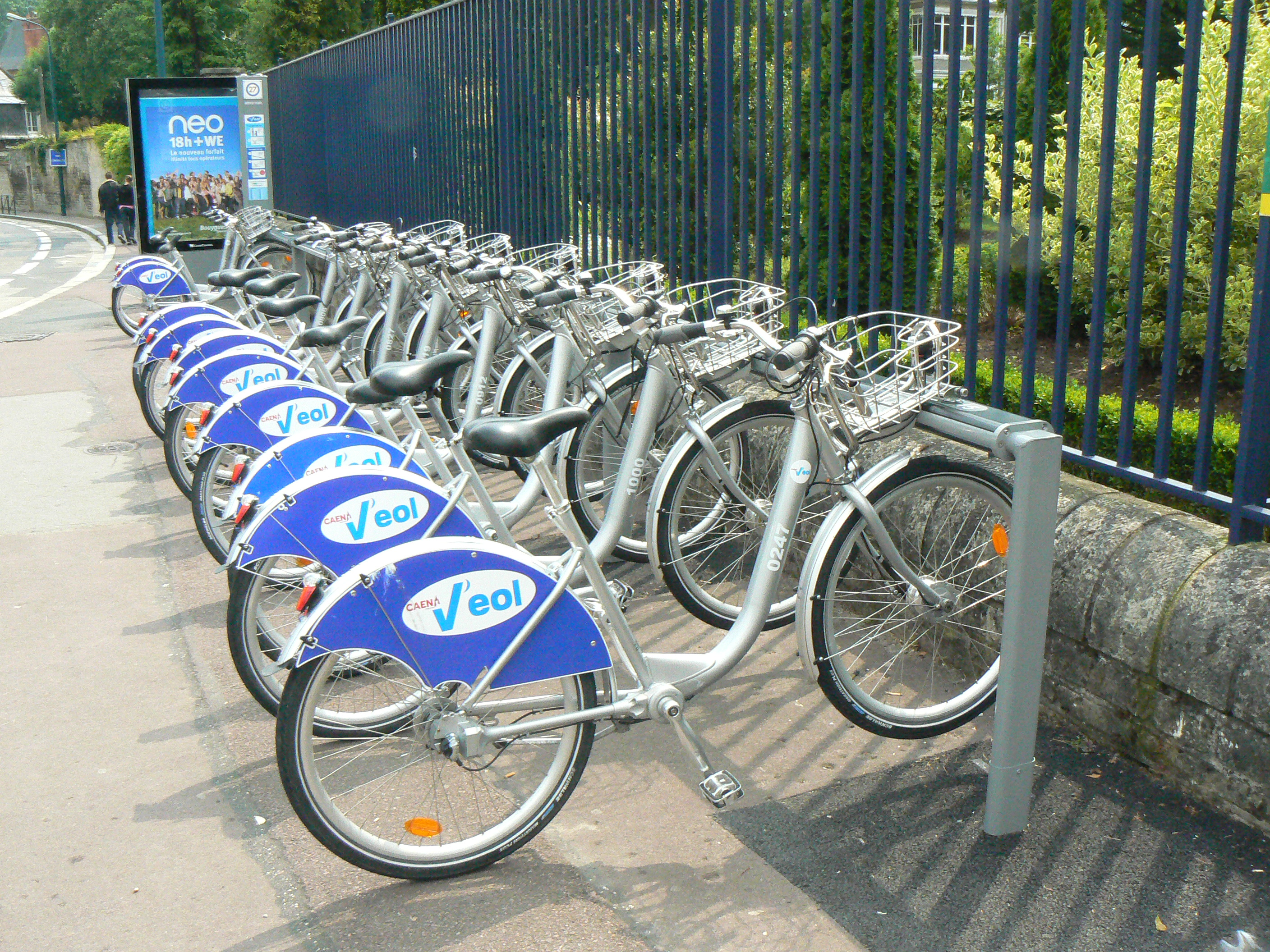 Station V'eol Caen Jardin des Plantes, station n°27